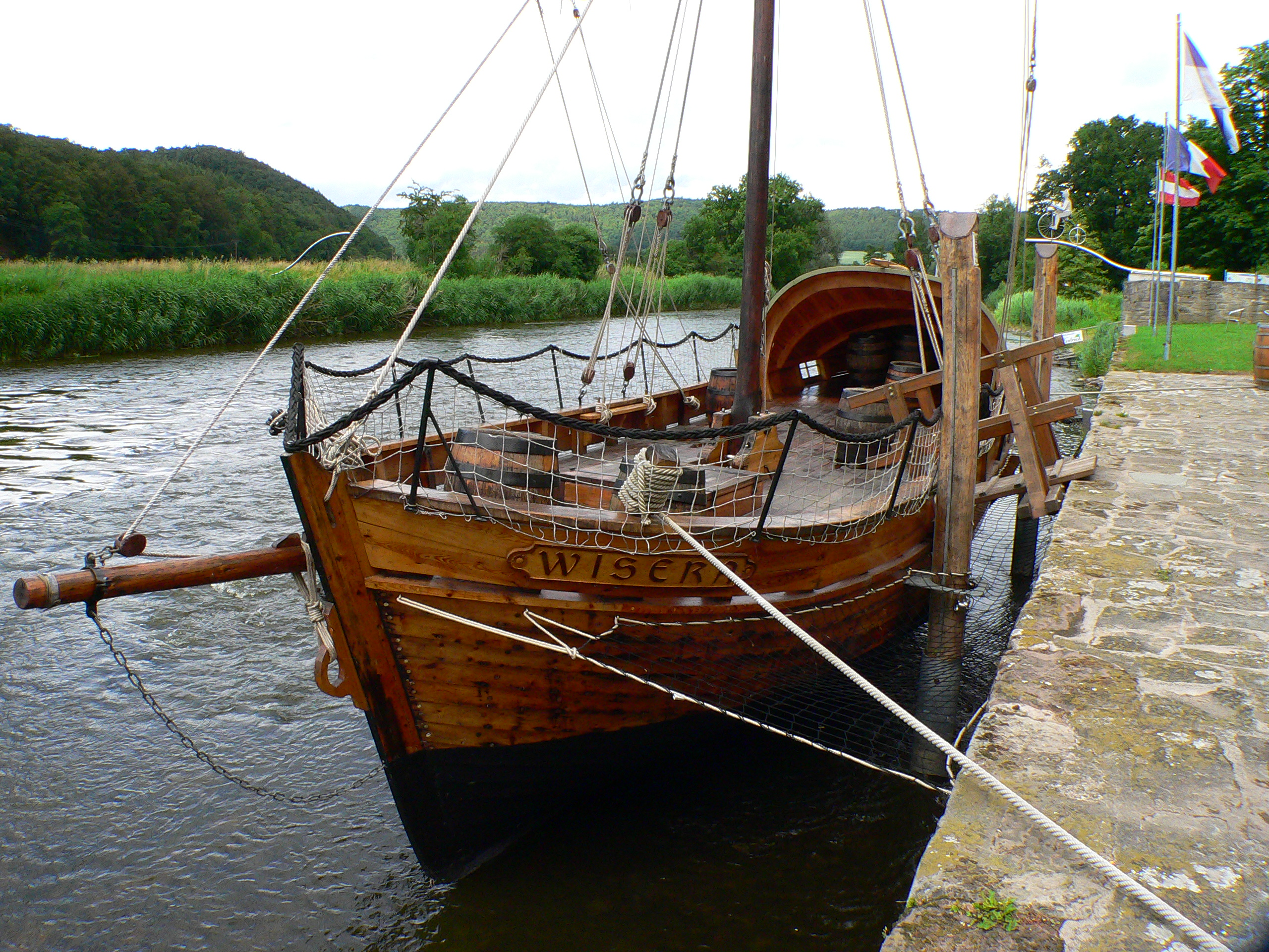 Werra (Deutschland): Rekonstruktion eines Lastkahns um 1650 auf der bis dahin schiffbaren Werra.